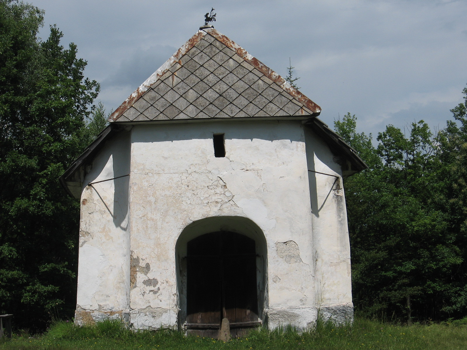 Kapela sv. Bernarda, ki stoji na najvišji točki razloženega naselja.